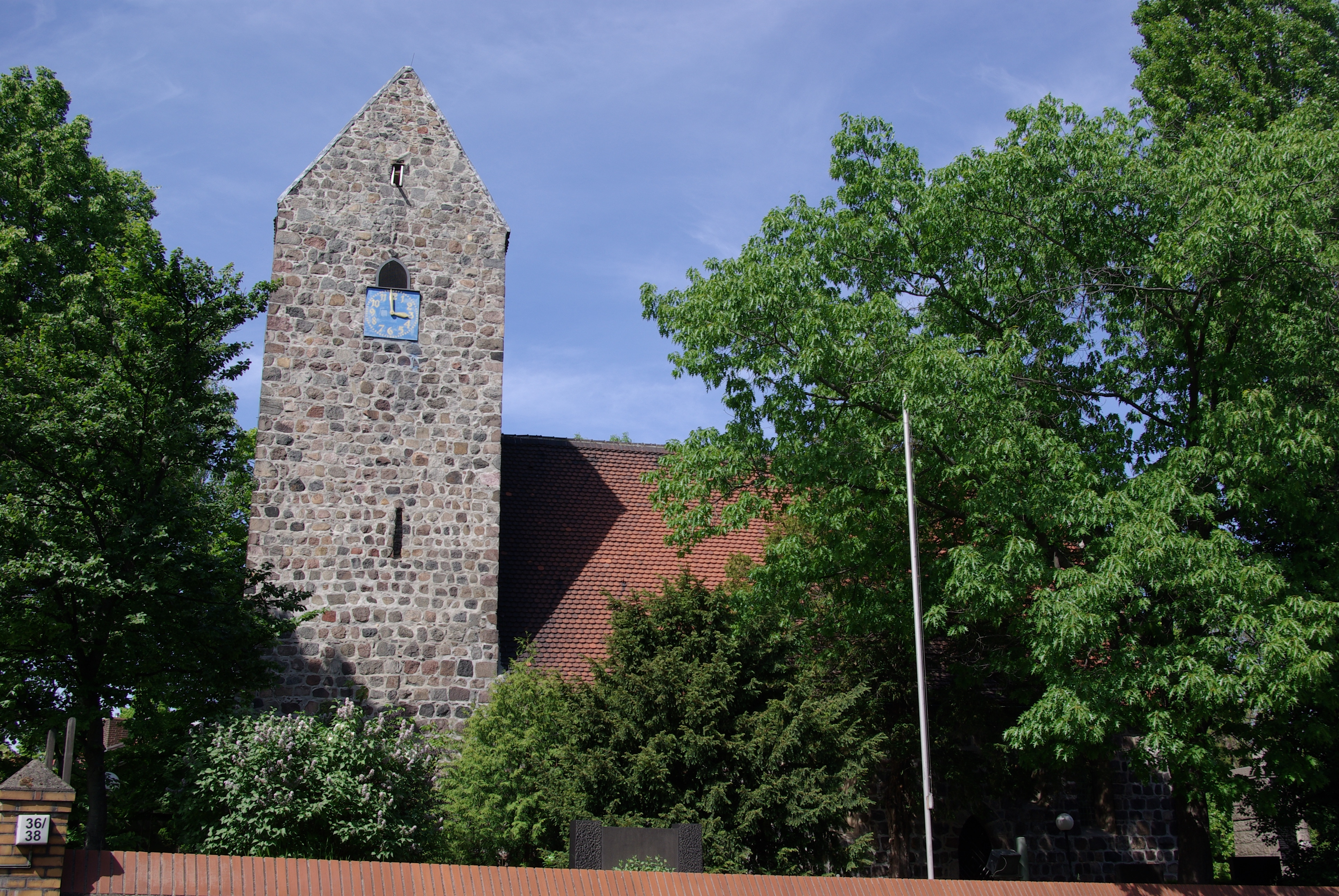 Buckow in Berlin. Die Dorkirche an der Straße Alt-Buckow steht unter Denkmalschutz.